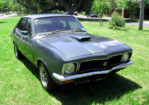 Holden LJ Torana sedan.